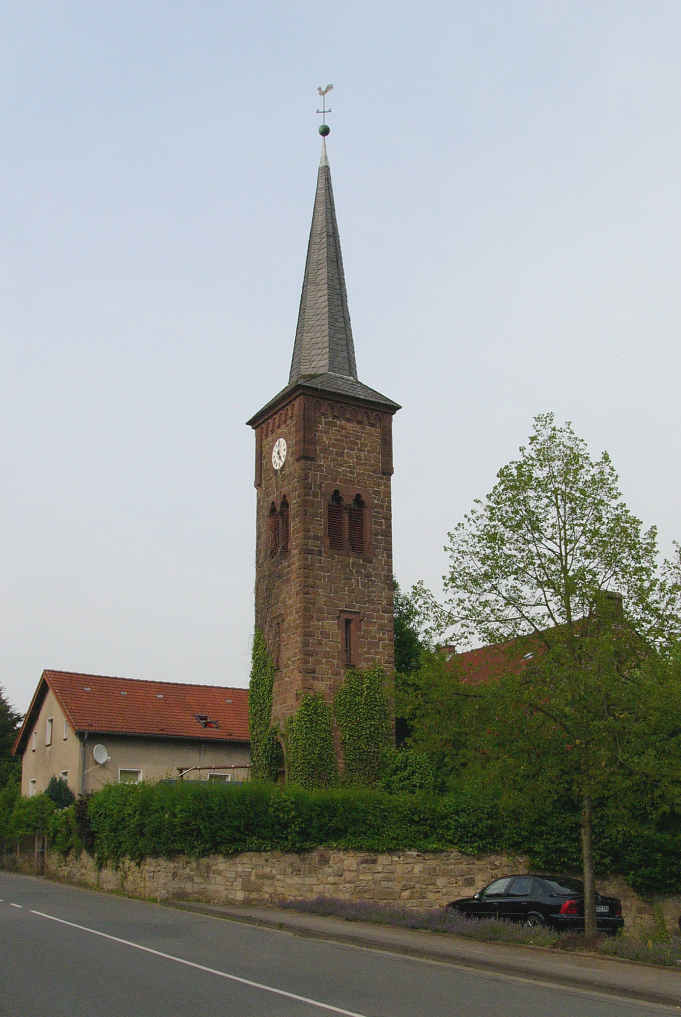 Uhrenturm in Großenmarpe, Ortsteil von Blomberg, Germany